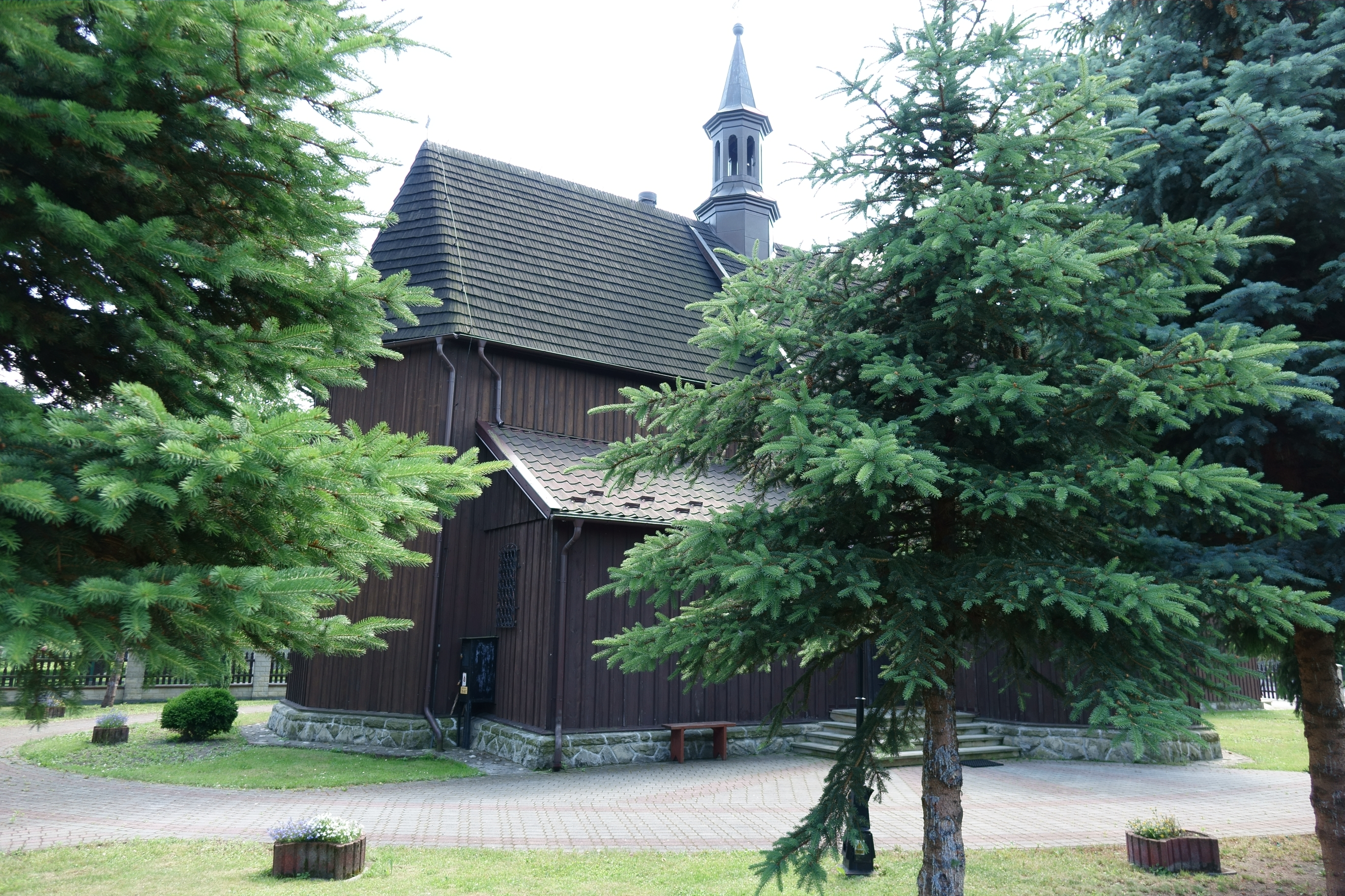 Żelichów - rzymskokatolicki kościół parafialny p.w. Najświętszego Serca Jezusa (dec.: św. Zygmunta), drewn.-mur. 1642 (na obecne miejsce przeniesiony z Pleśnej w 1938r.)